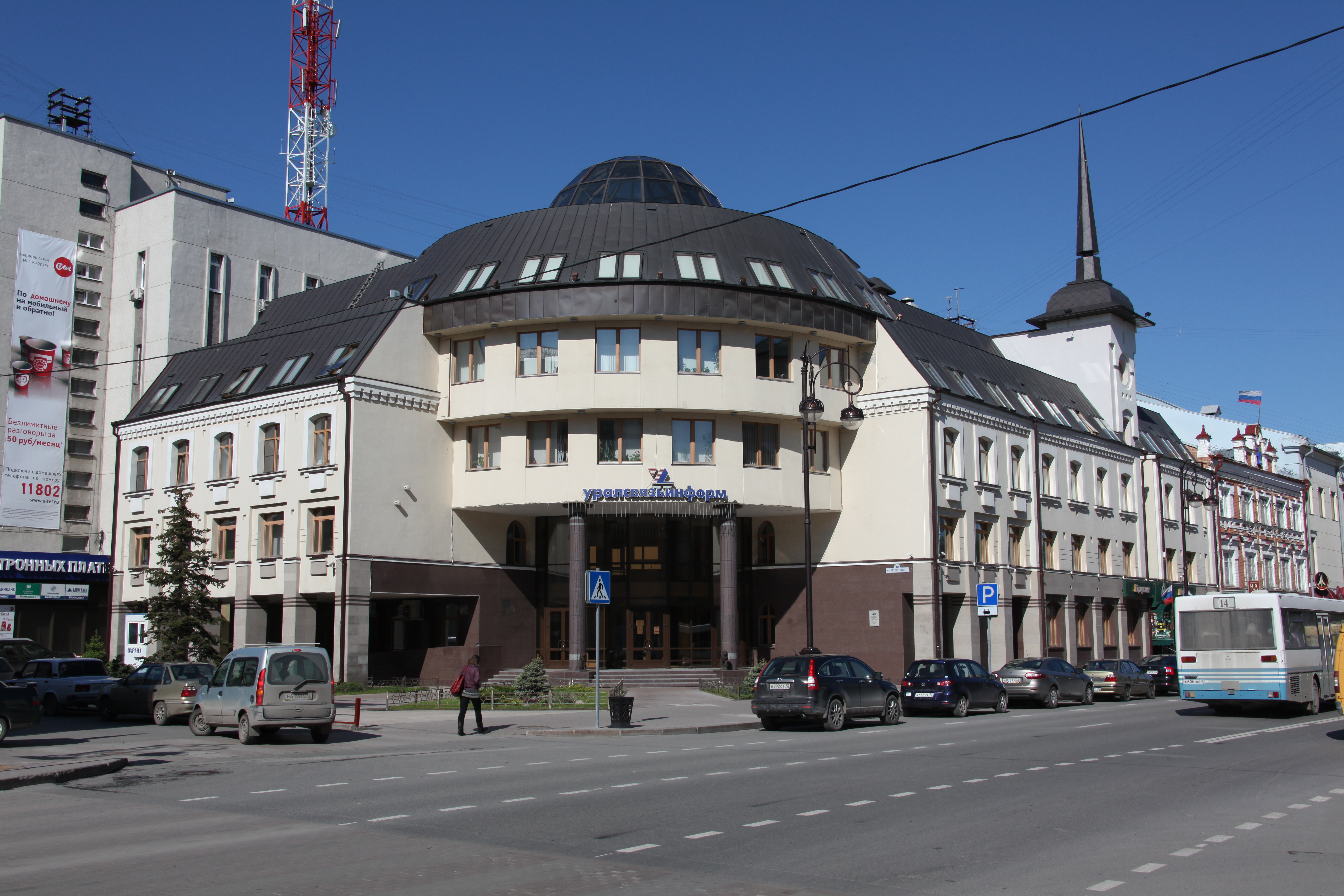 Oficejo en Respubliko 40/1. Tjumeno, Rusio.